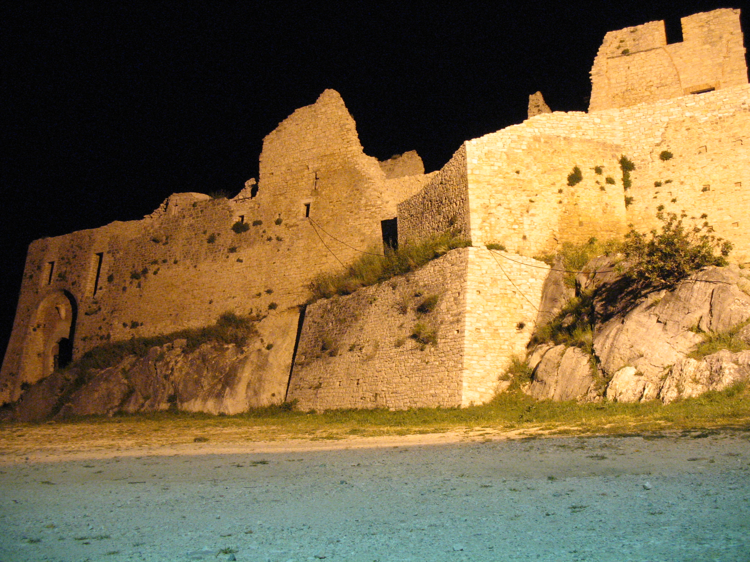 Castello d'Evoli a Castropignano(provincia di Campobasso), illuminato di notte